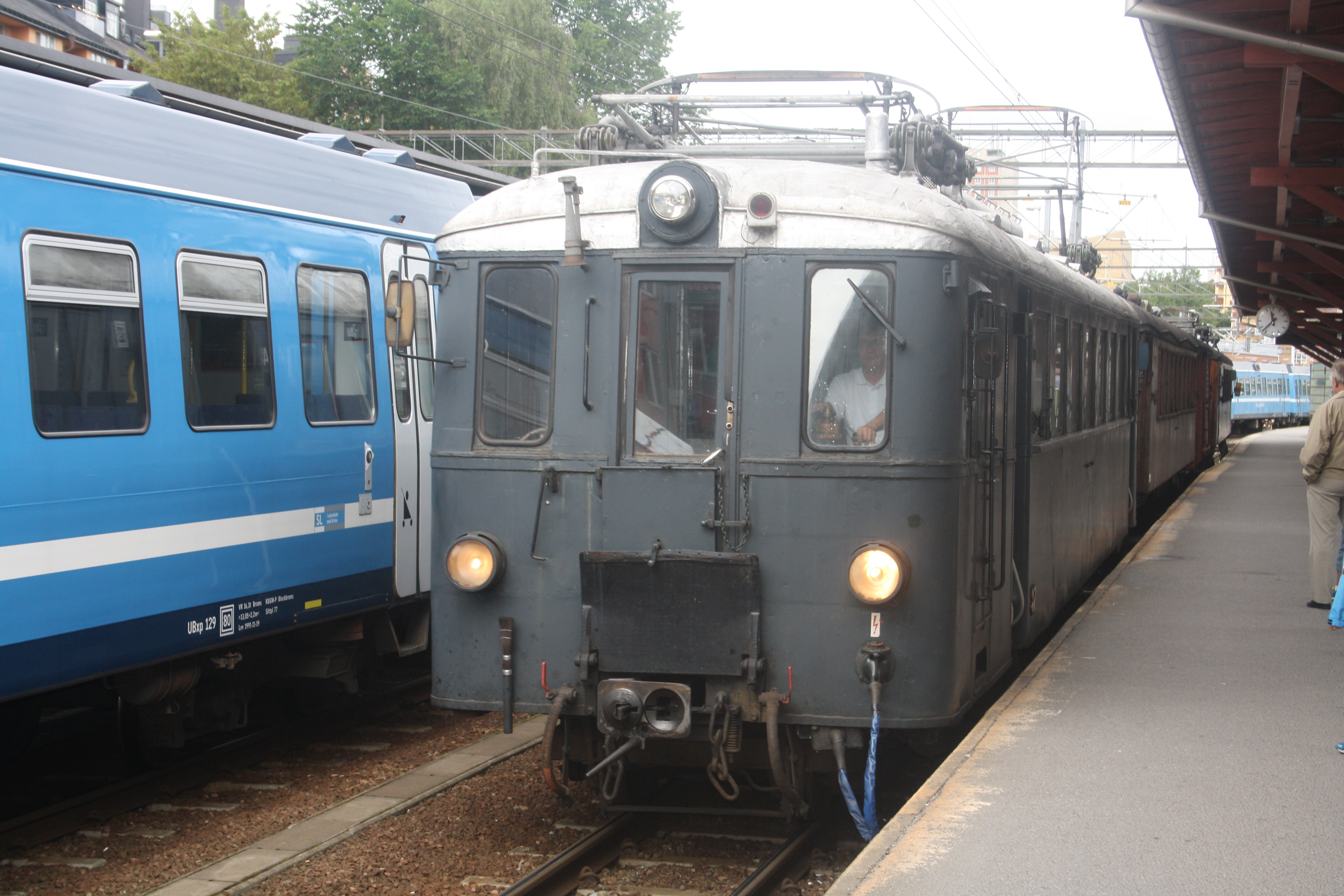 Roslagsbanan på Stockholm Östra - augusti 2014 - 2